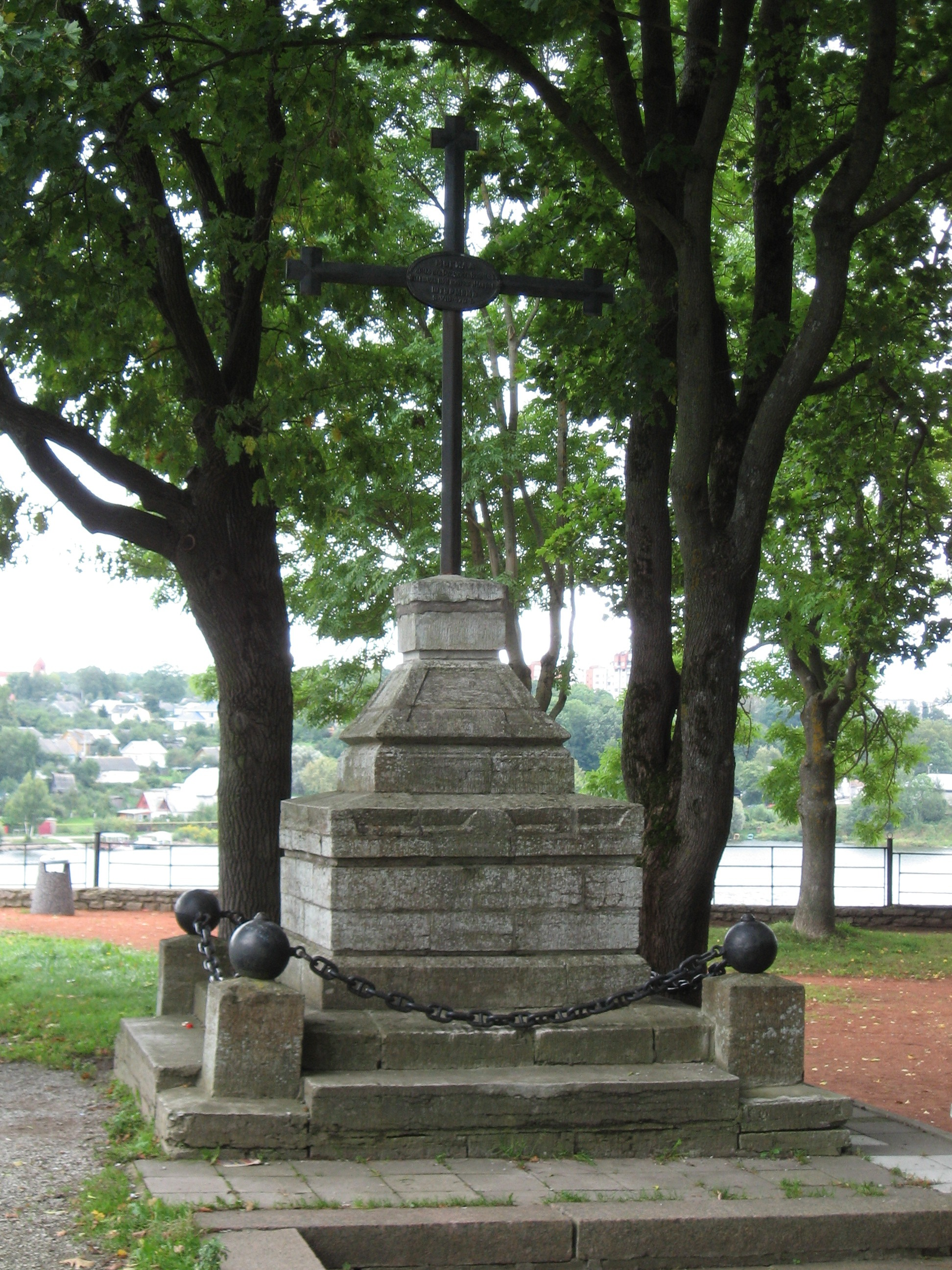 Monument Põhjasõjas langenud vene sõjaväelastele